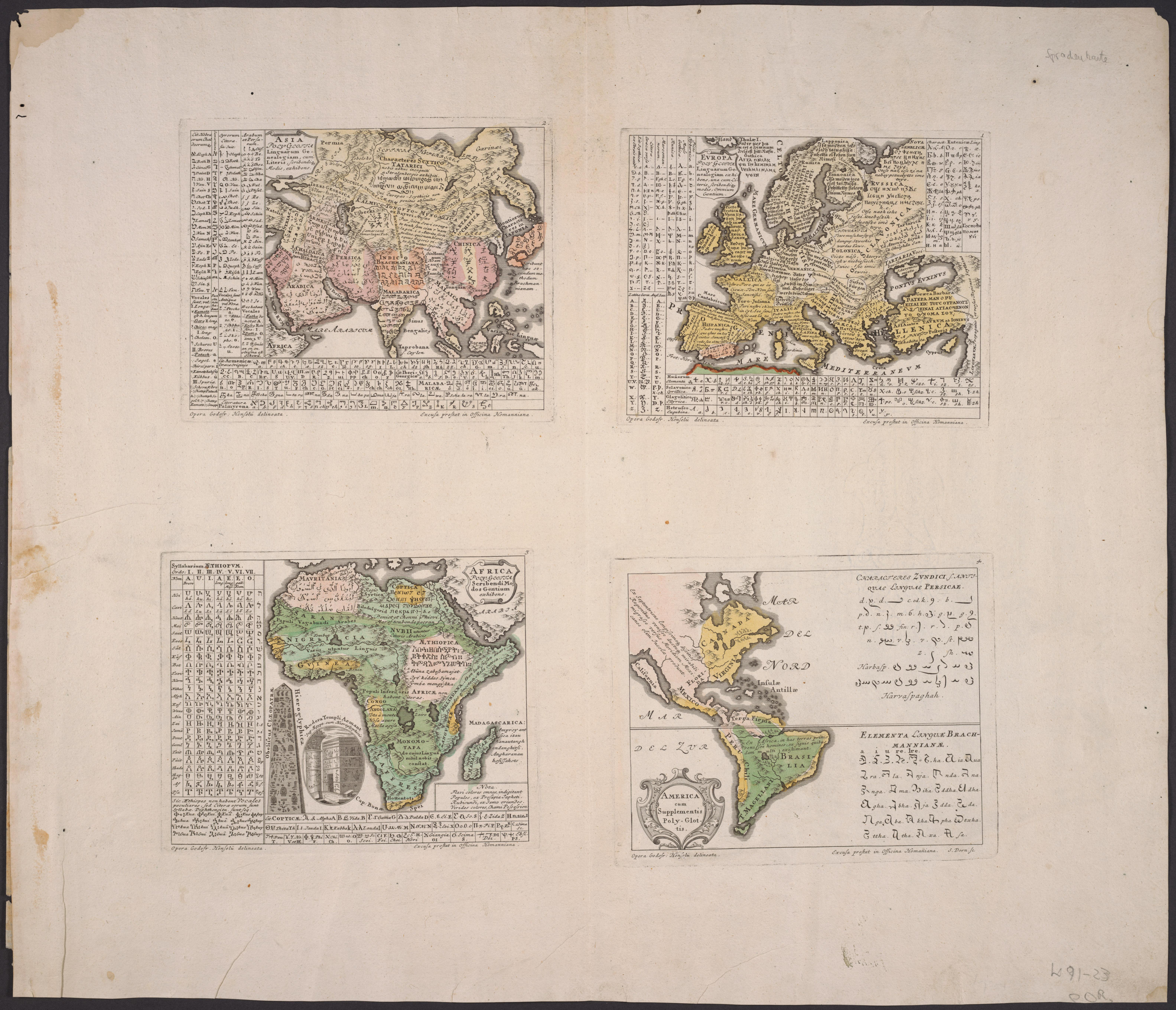 (Full Title) Asia Polyglotta, Linguarum Genealogiam cum Literis, scribundique Modis exhibens; Europa Polyglotta, Linguarum Genealogiam exhibens, una cum Literis, scribendique modis, omnium gentium; Africa Polyglotta Scribendi Modos Gentium exhibens; America cum Supplementis Polyglottis.